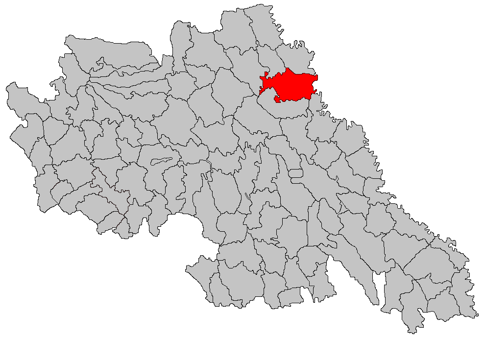 Categorie:Hărţi ale judeţului Iaşi